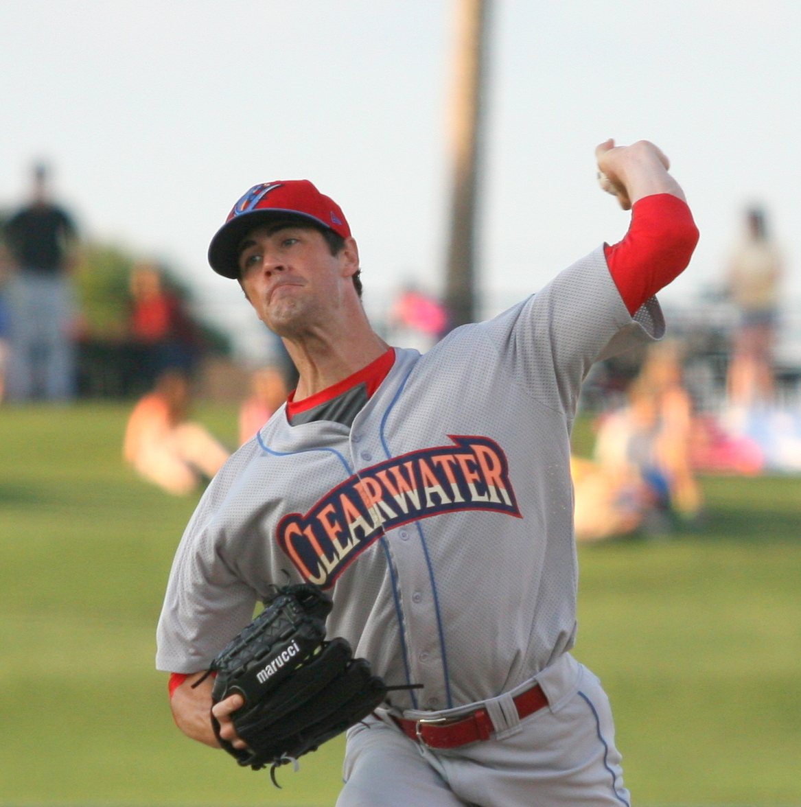 Cole Hamels